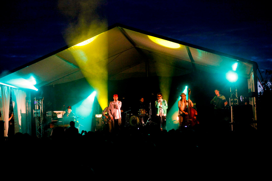 Elokuu keikalla Sulatto 2012 -tapahtumassa Raahessa.